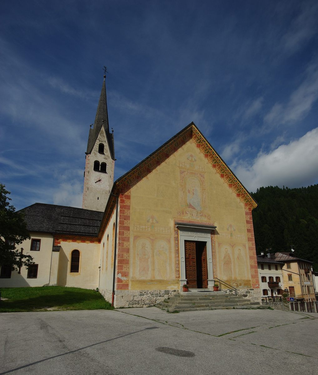 Chiesa San Nicolò in Fusine (Val di Zoldo)